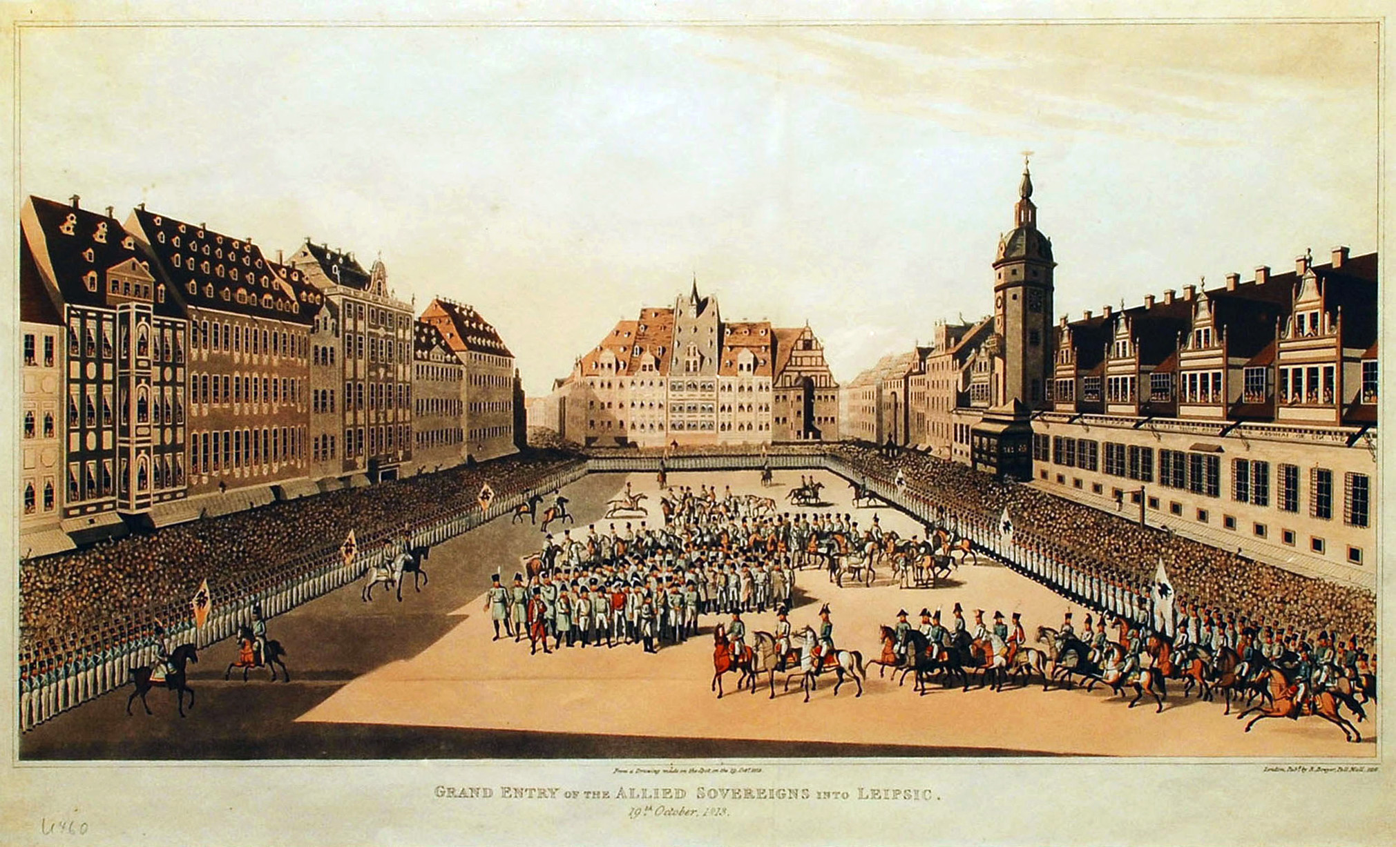 Idealisierte Darstellung. Auf dem Markt, der hier dargestellt ist, hatten noch kurz vorher Rückzugsgefechte mit den fliehenden Franzosen stattgefunden.